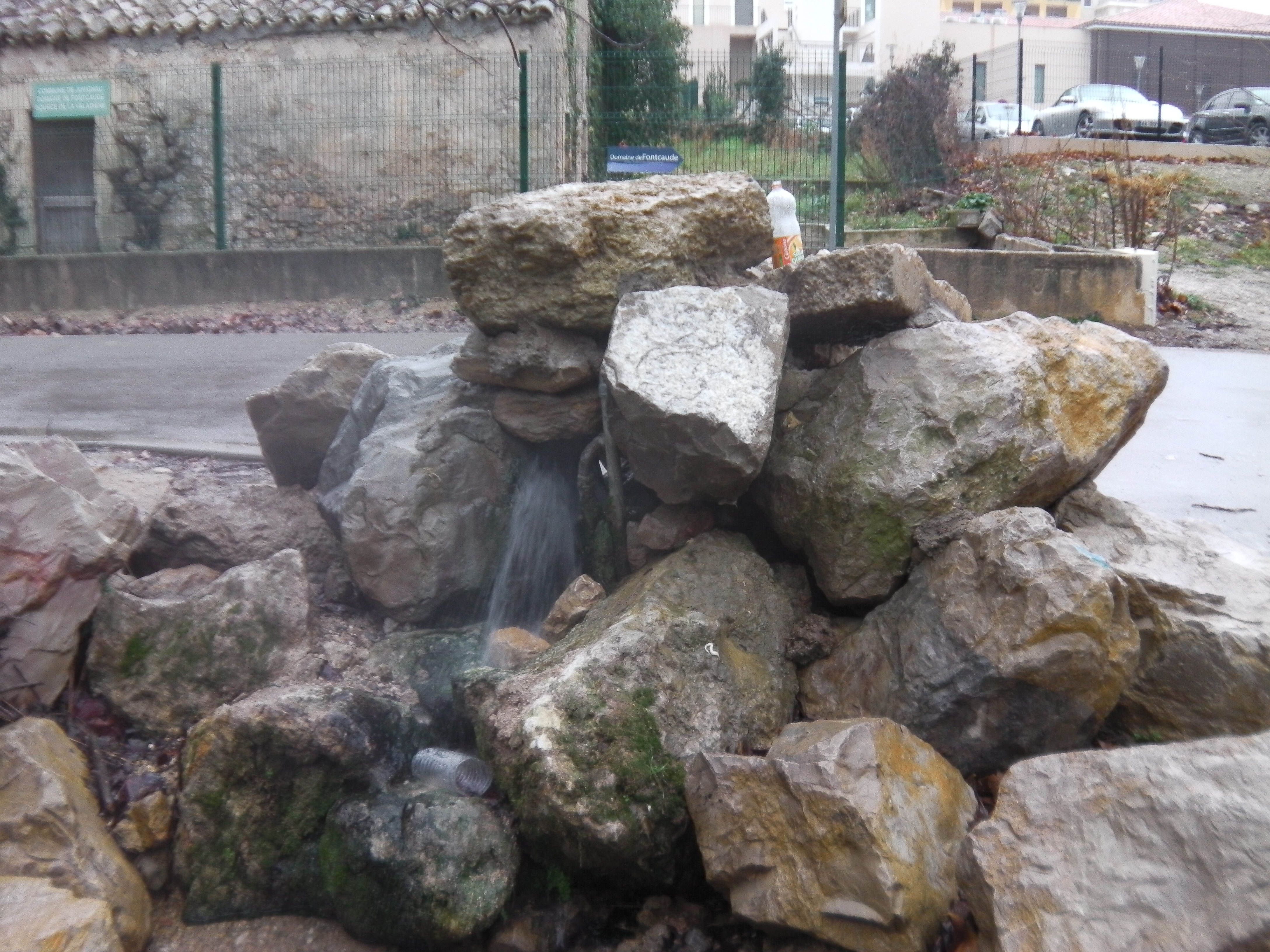 source de la Valadière à Juvignac (Hérault)